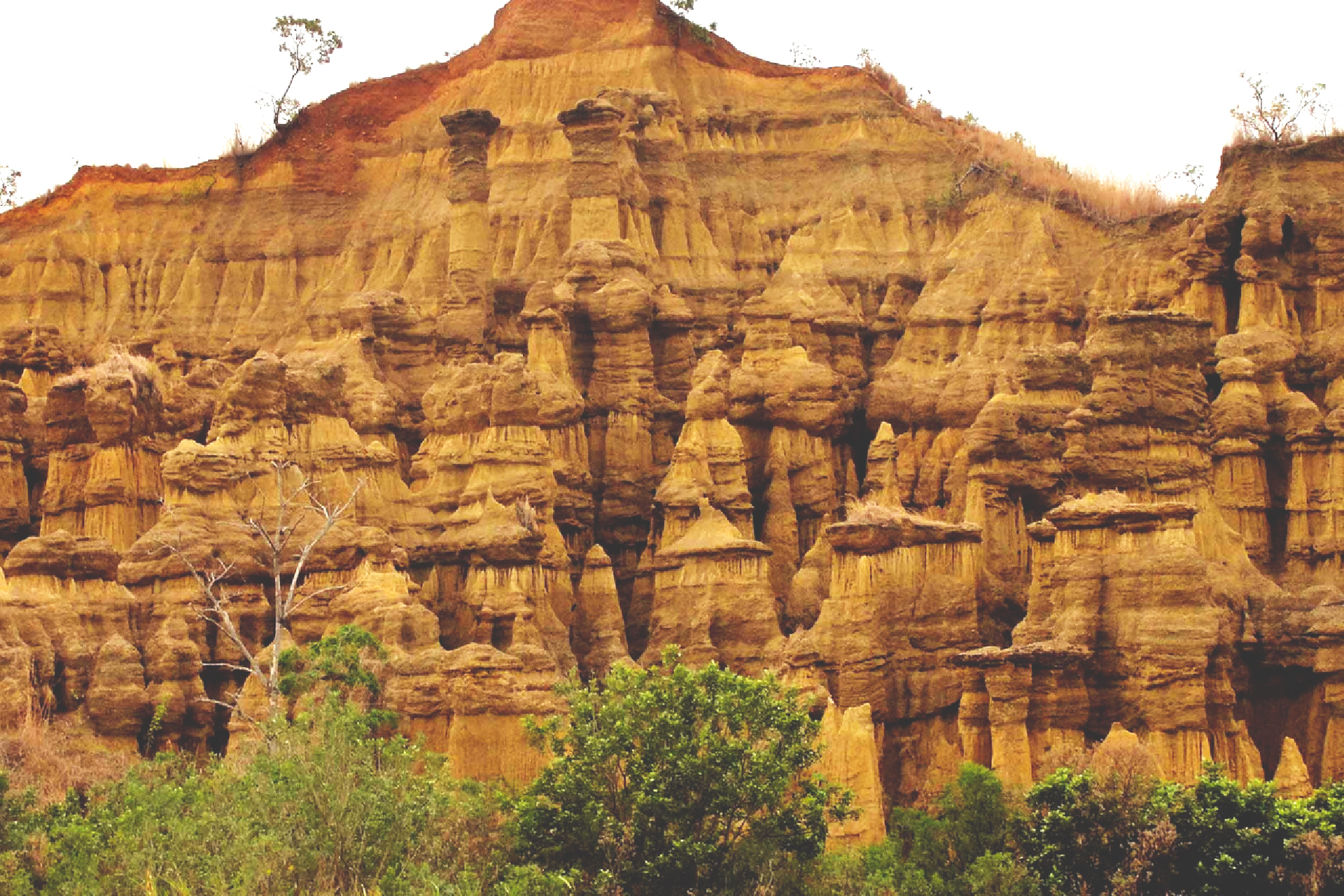 Sitio Natural Los Frailes De Ospino O Mesetas Los Frailes